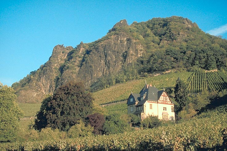 Weinbau am Drachenfels (Siebengebirge)